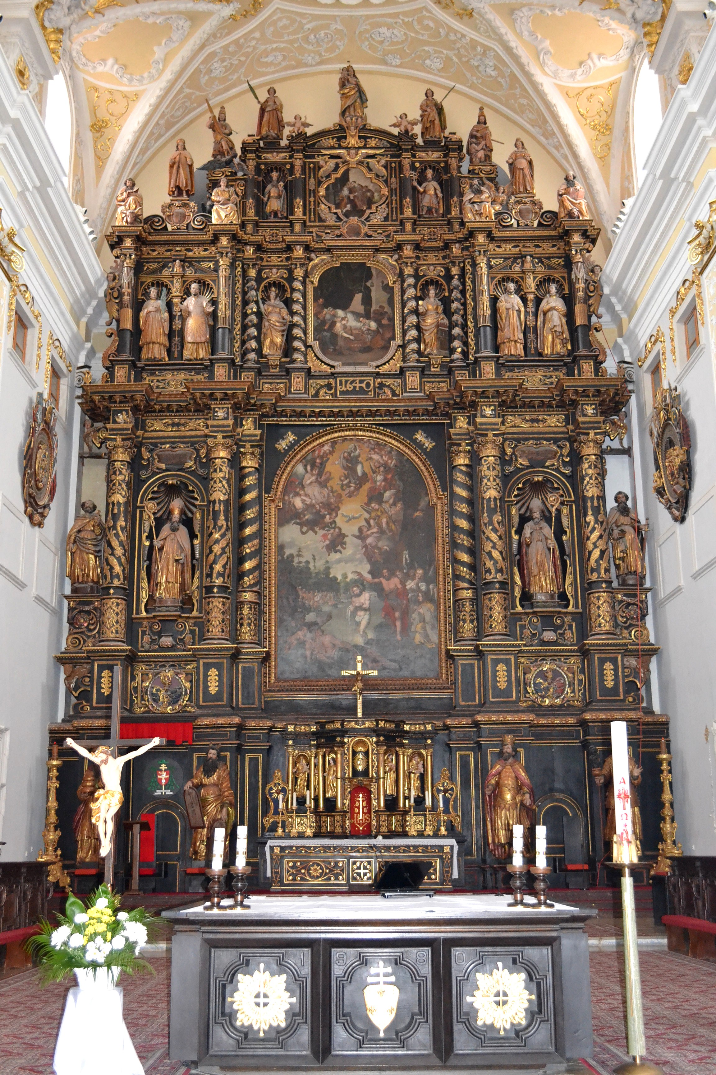 Hlavný oltár katedrály. Monumentálna štvoretážová architektúra vznikla v rokoch 1637 - 1640